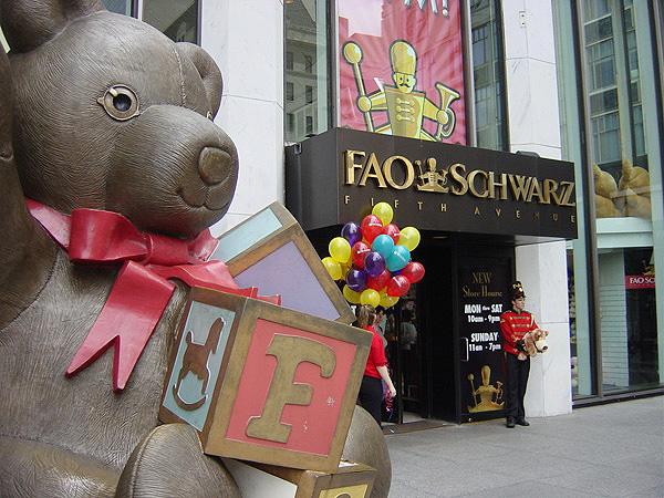 Es la juguetería del famoso piano de BIG (sobre el que saltaba Tom Hanks) .